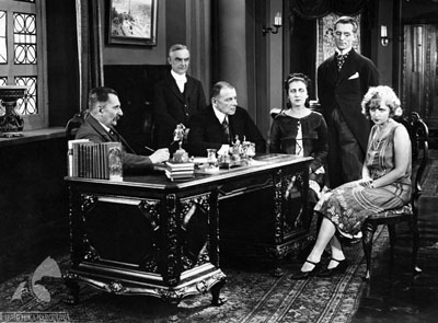 Кадр из фильма Вампиры Варшавы. Тайна такси № 1051 (Польша.1925 г.)